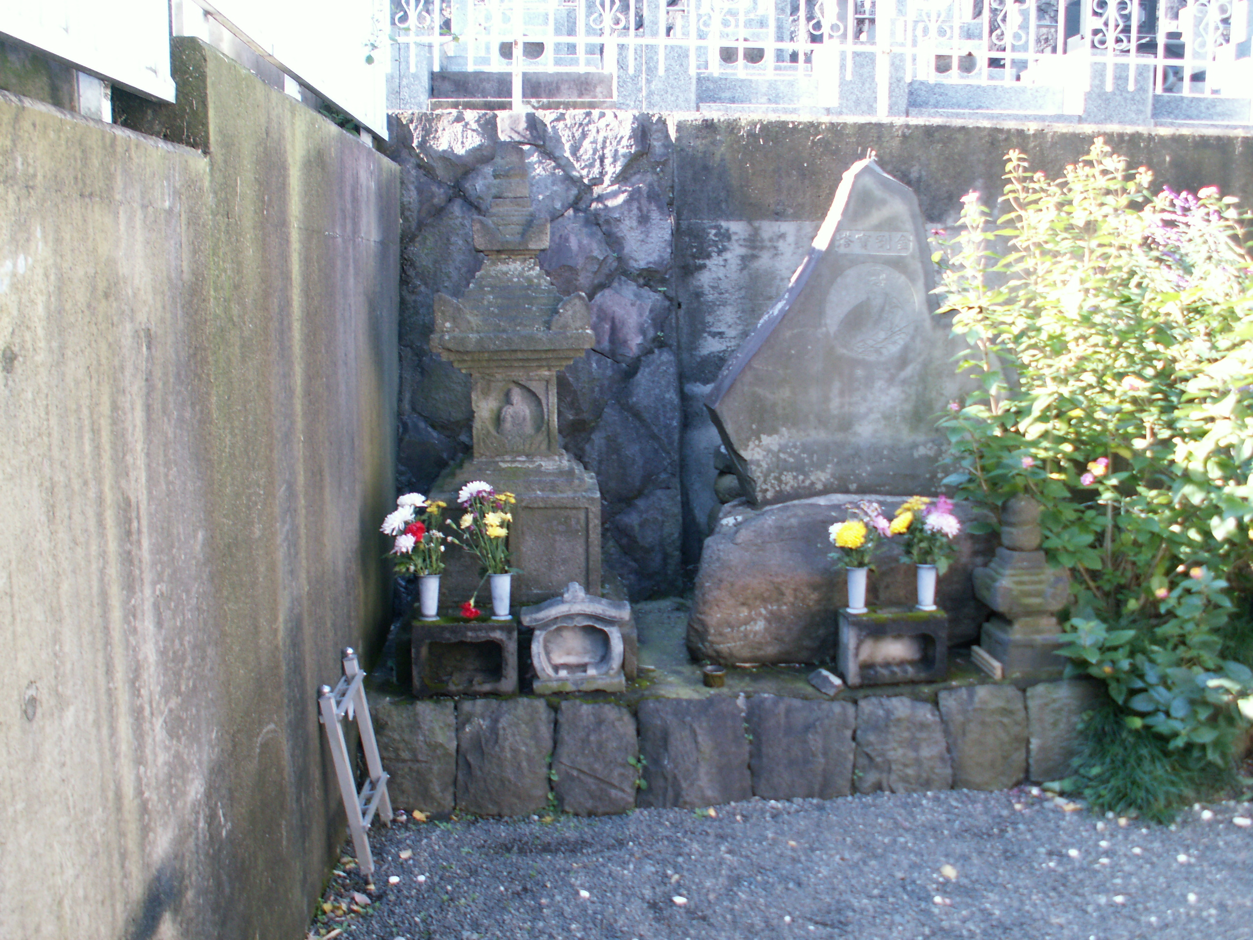 円光寺 (厚木市)境内にある、伝ja:愛甲季隆のja:宝筐印塔